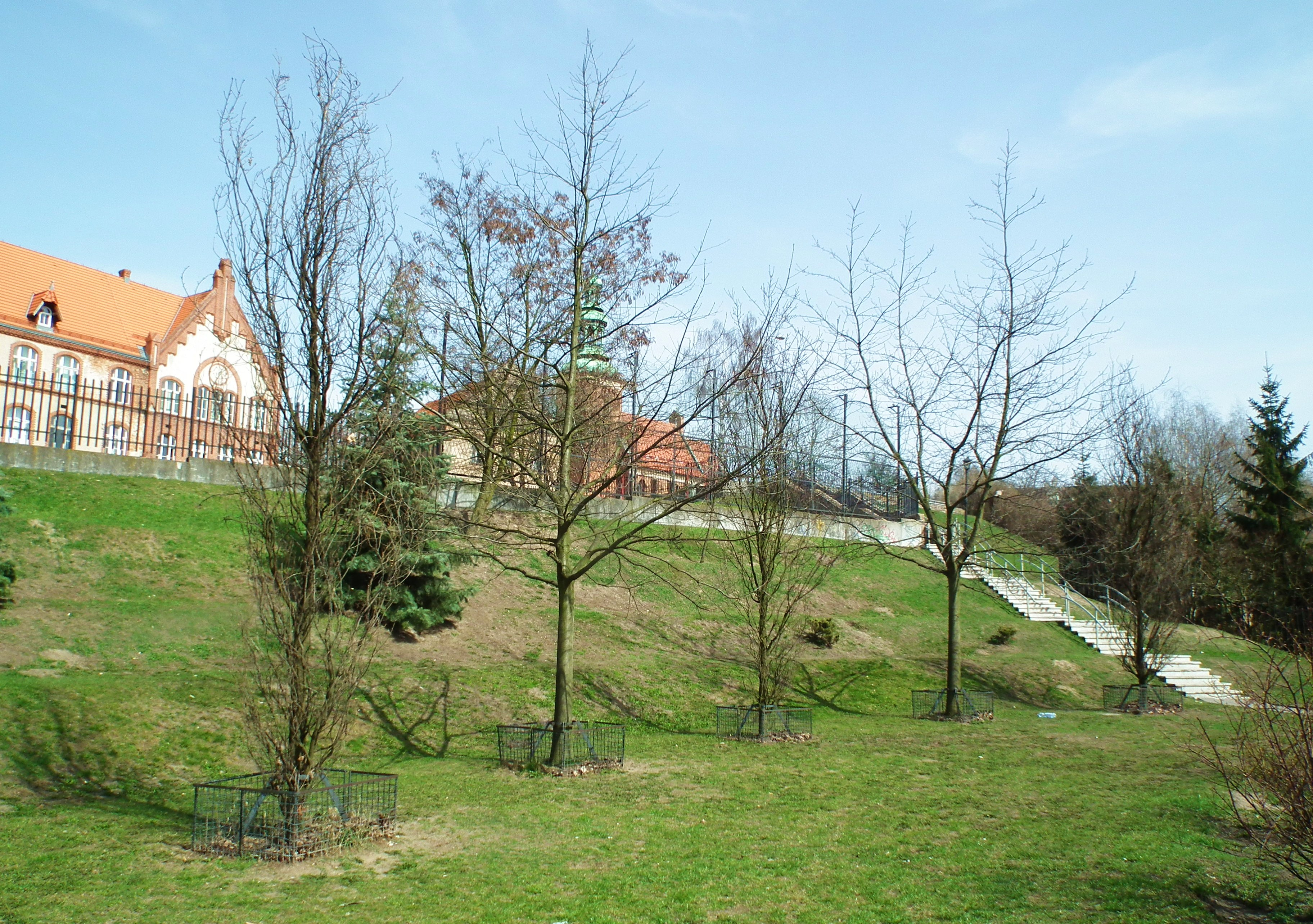 Dolina Pojednania w Gnieźnie.